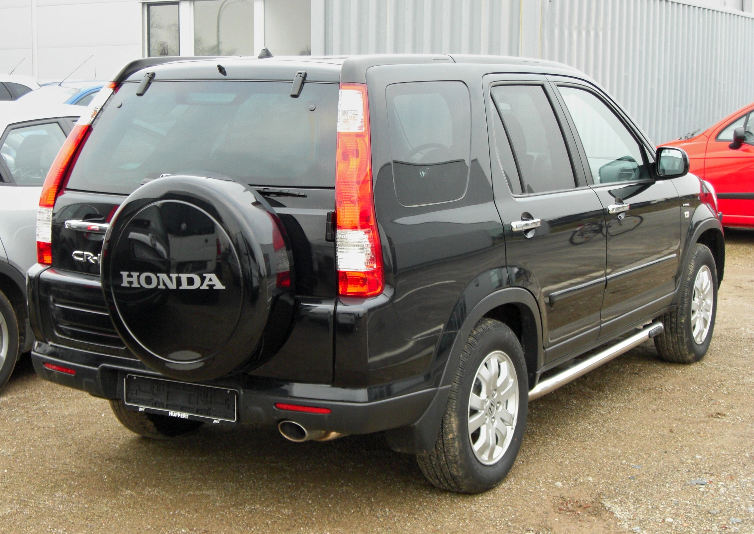 Honda CR-V